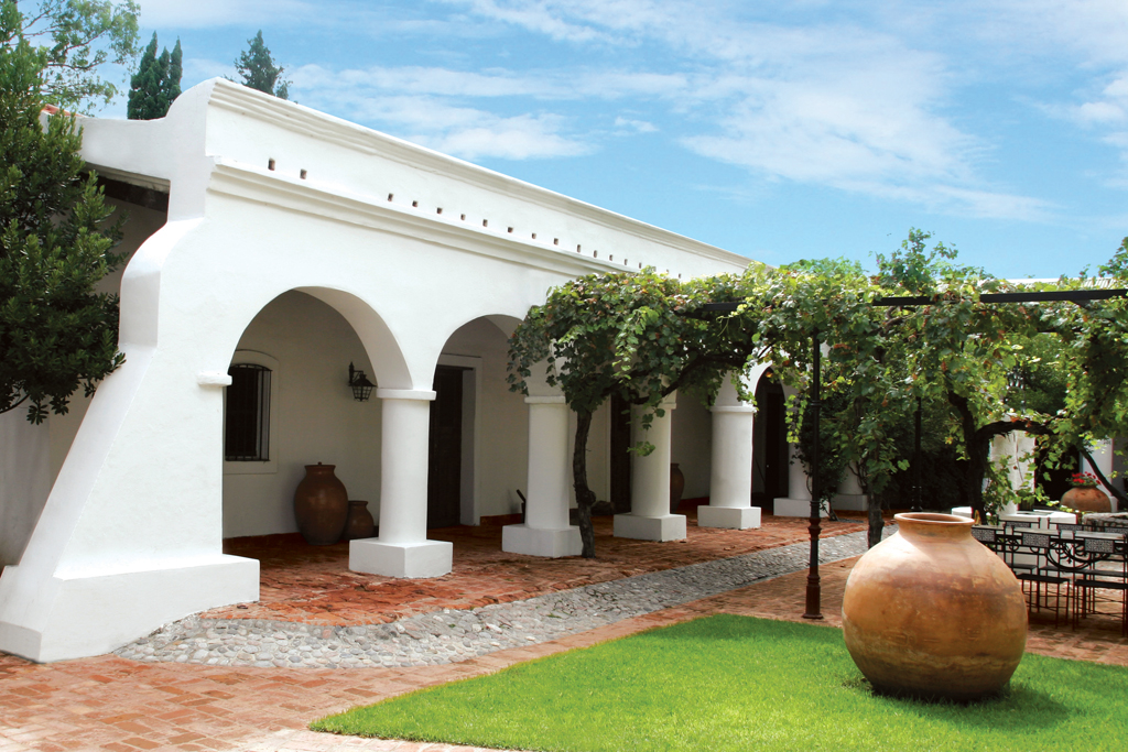 Estancia Siguimán, casona historica de estilo colonial.